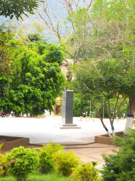 Betijoque, estado Trujillo - Venezuela